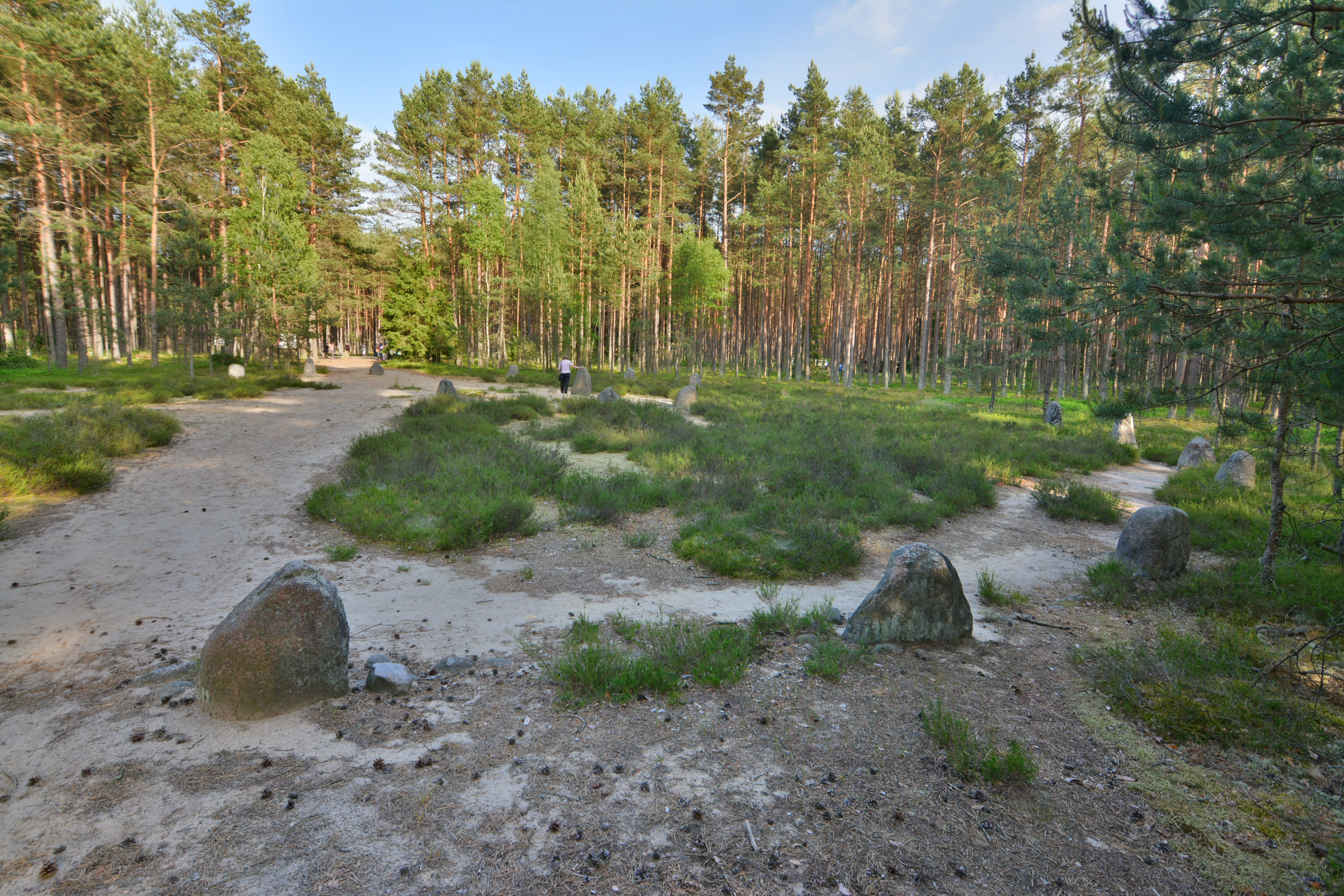 Cmentarzysko z kręgami kamiennymi w Grzybnicy koło Koszalina